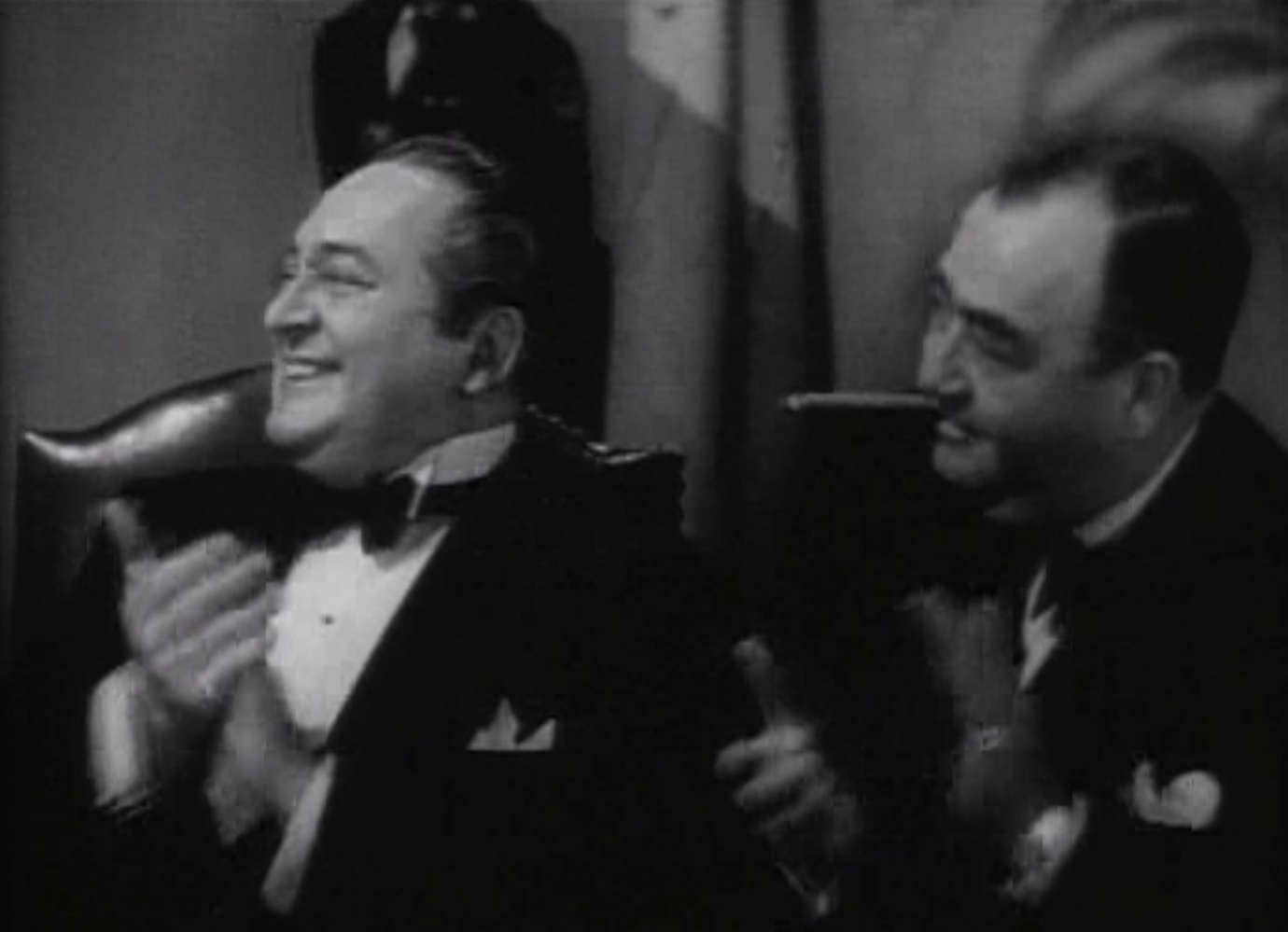 Edward Arnold and Dick Elliot